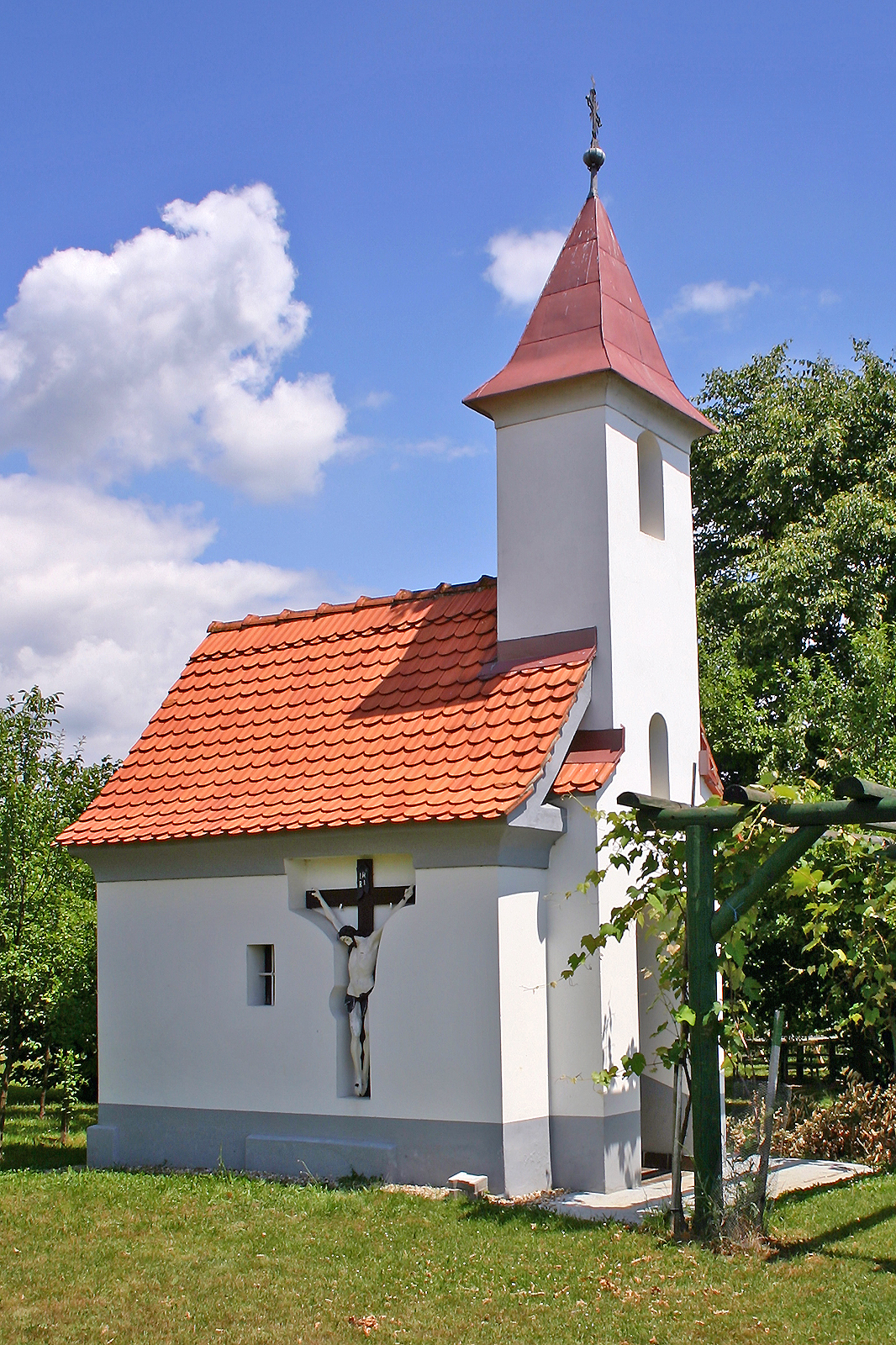 Kapela svetega Urbana, Bogojina. Saint Urban chapel, Bogojina. Der heilige Urban Kapelle, Bogojina.